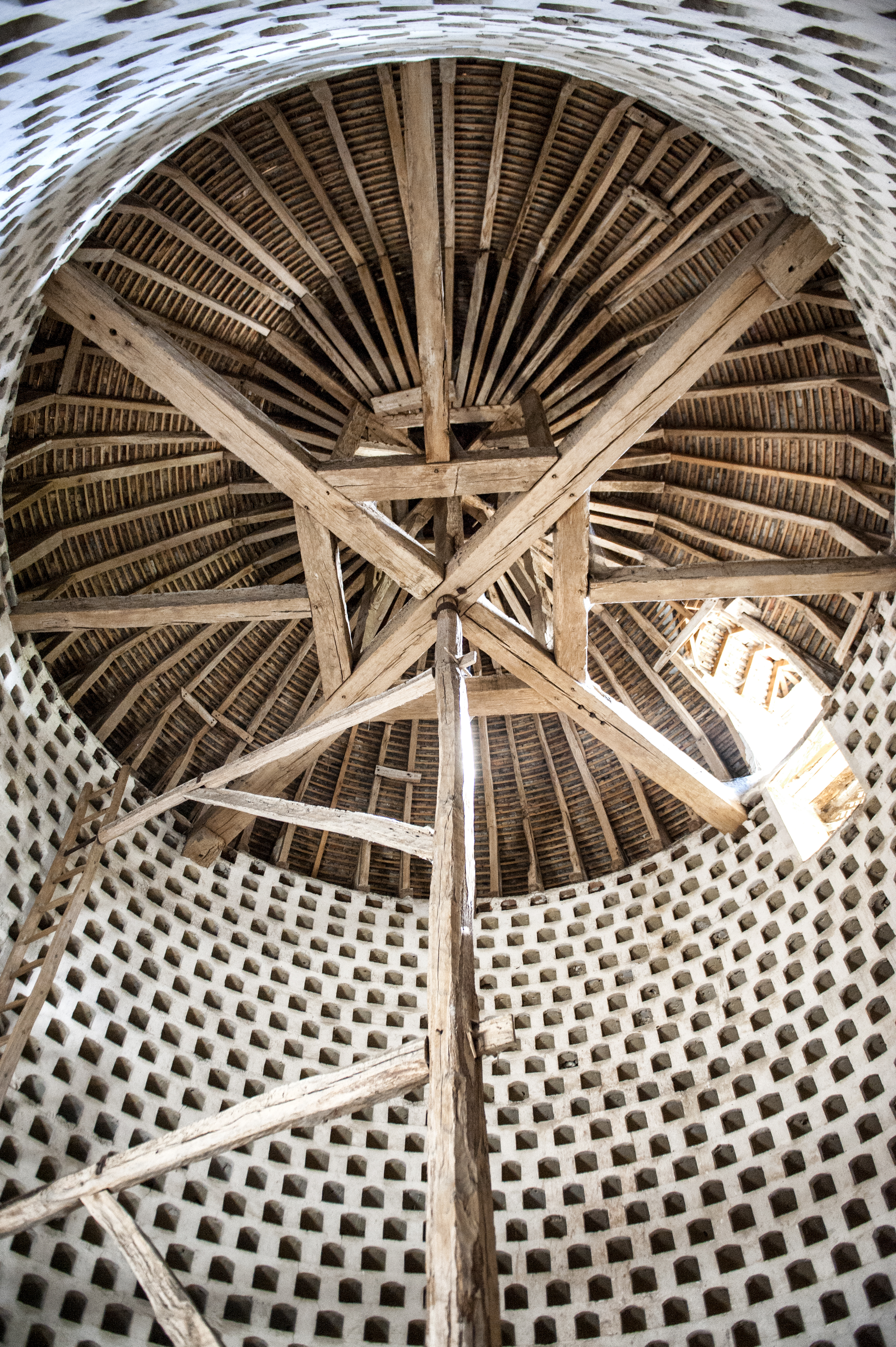 Château du Haut Rosay - intérieur pigeonnier